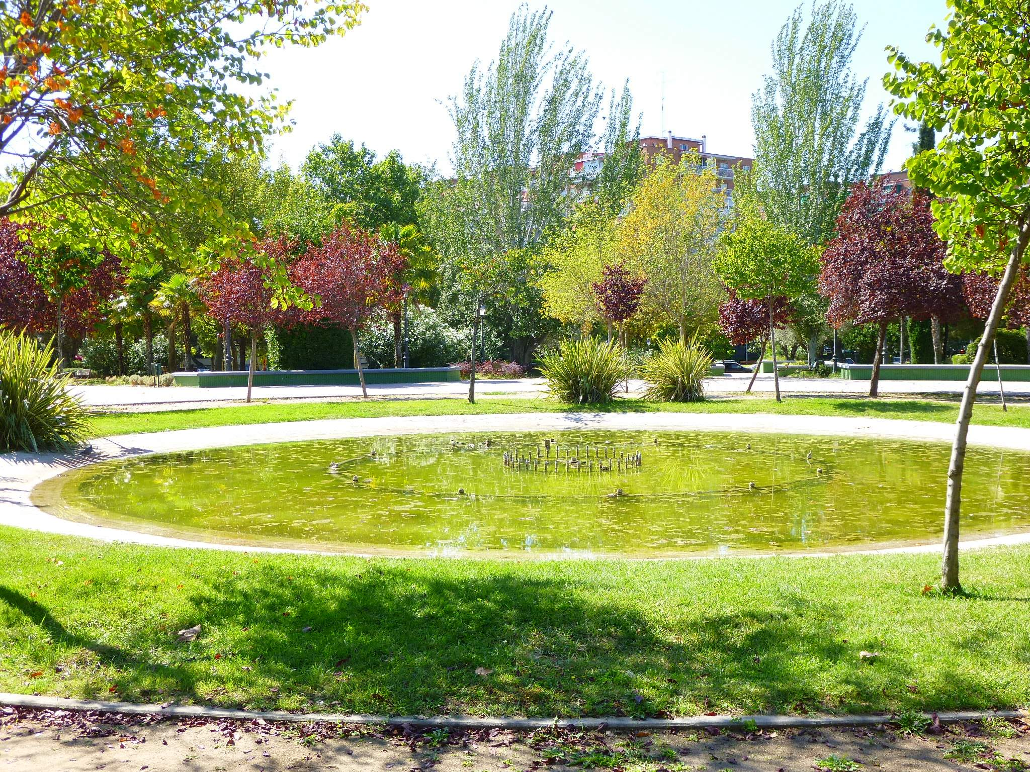 Paisaje urbano de Alcorcón (Madrid)